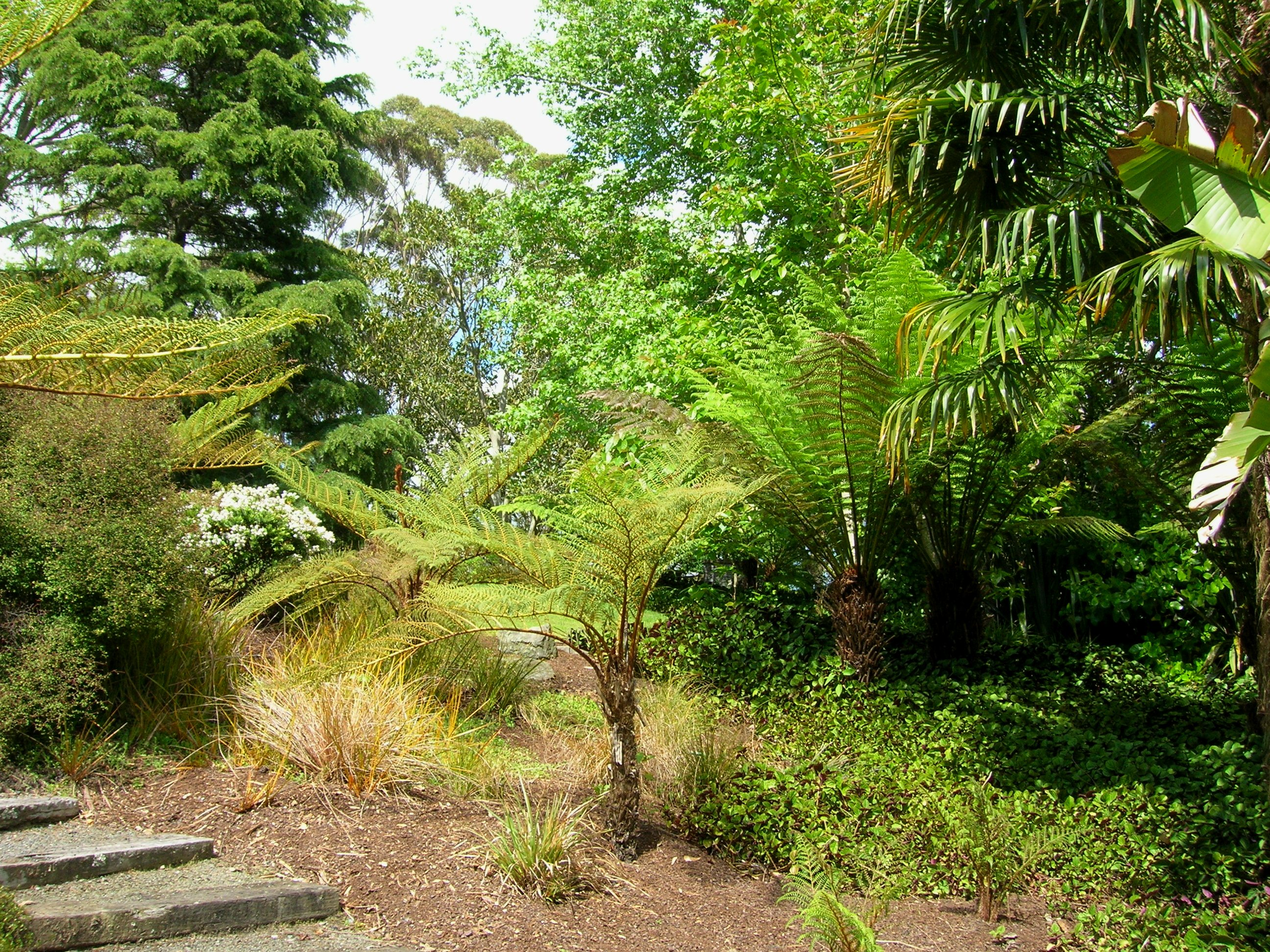 i103105 049